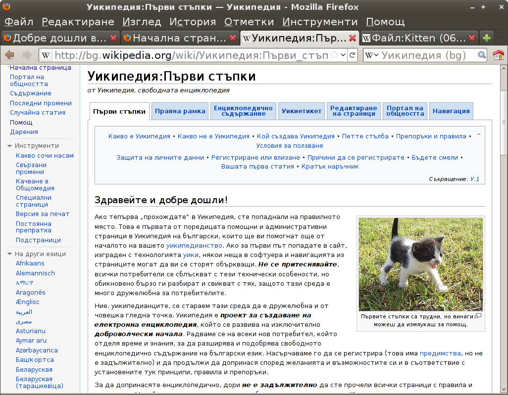 Ekrankopio de bulgarlingva Firefox 6.0 kun la paĝo La GNOME-a koloretoso estas «Shiki-Dust».